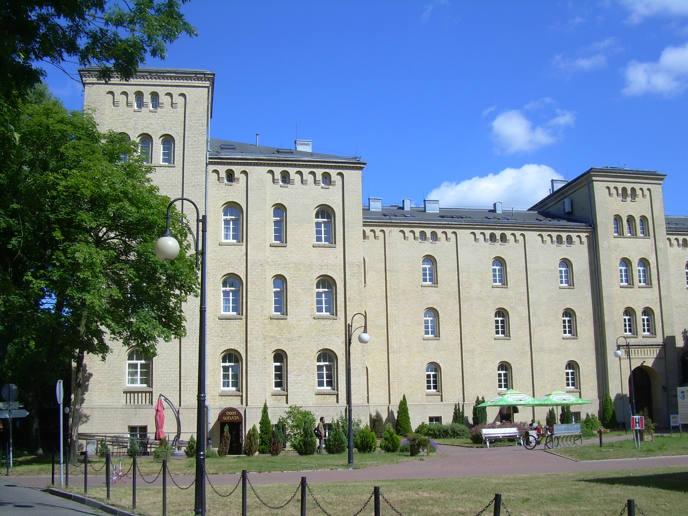 Academy of Music in Gdańsk. / Dawne koszary.